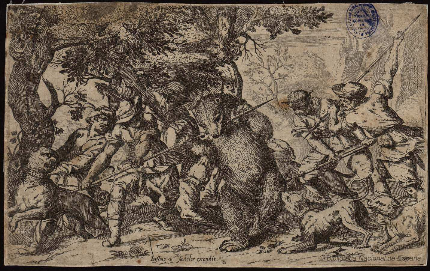 Caza del oso, aguafuerte firmado Iustus Sadeler excudit. Biblioteca Nacional de España. En Harvard Art Museums/Fogg Museum n.º M22312.54 [1] se atribuye a Odoardo Fialetti.